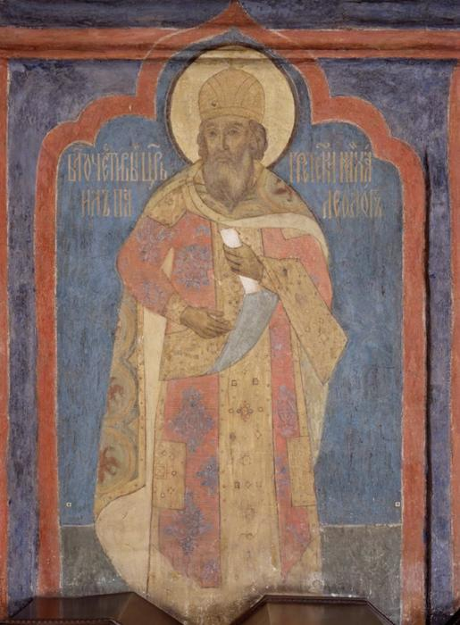 Архангельский собор. Условные портреты князей на столпах